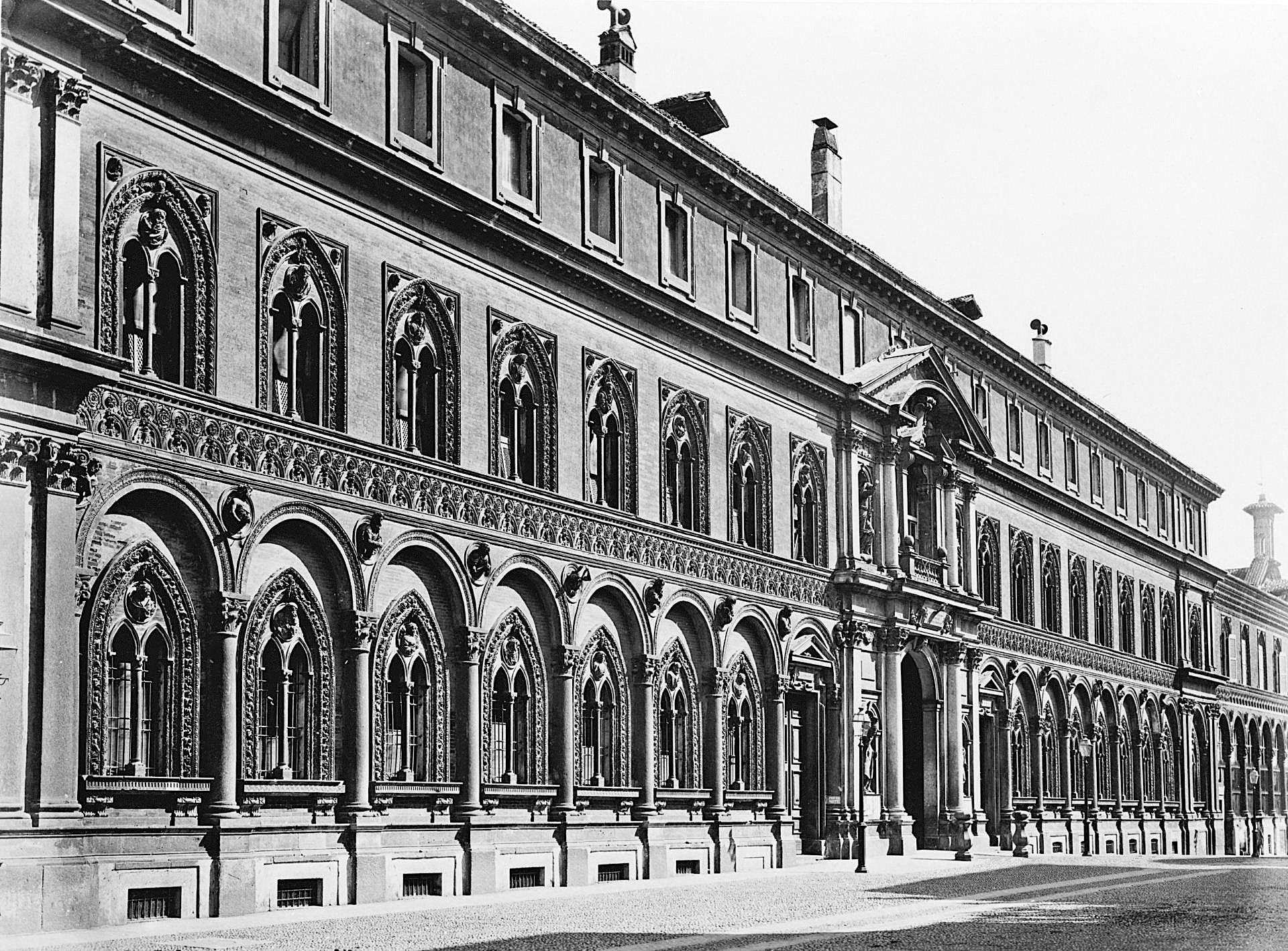 La Ca' Granda